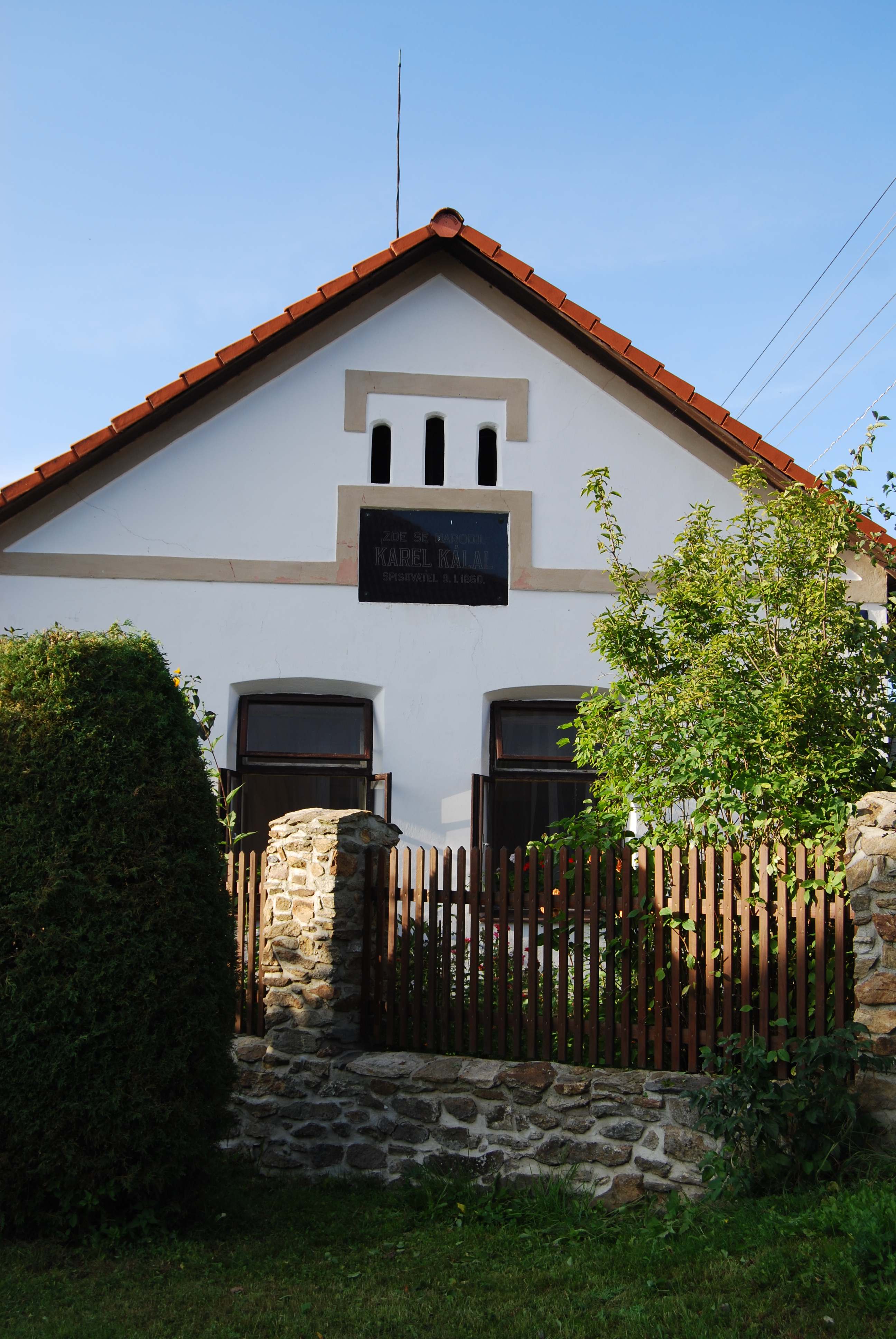 Rodný dům čp.1 s bronzovou pamětní deskou z roku 1930 spisovatele Karla Kálala. Rakov je část obce Bernartice v okrese Písek. Česká republika.